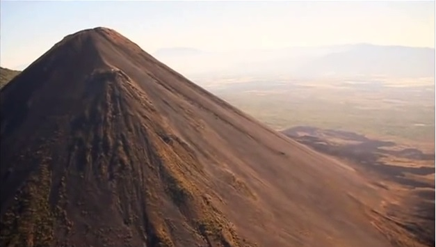 volcán de izalco